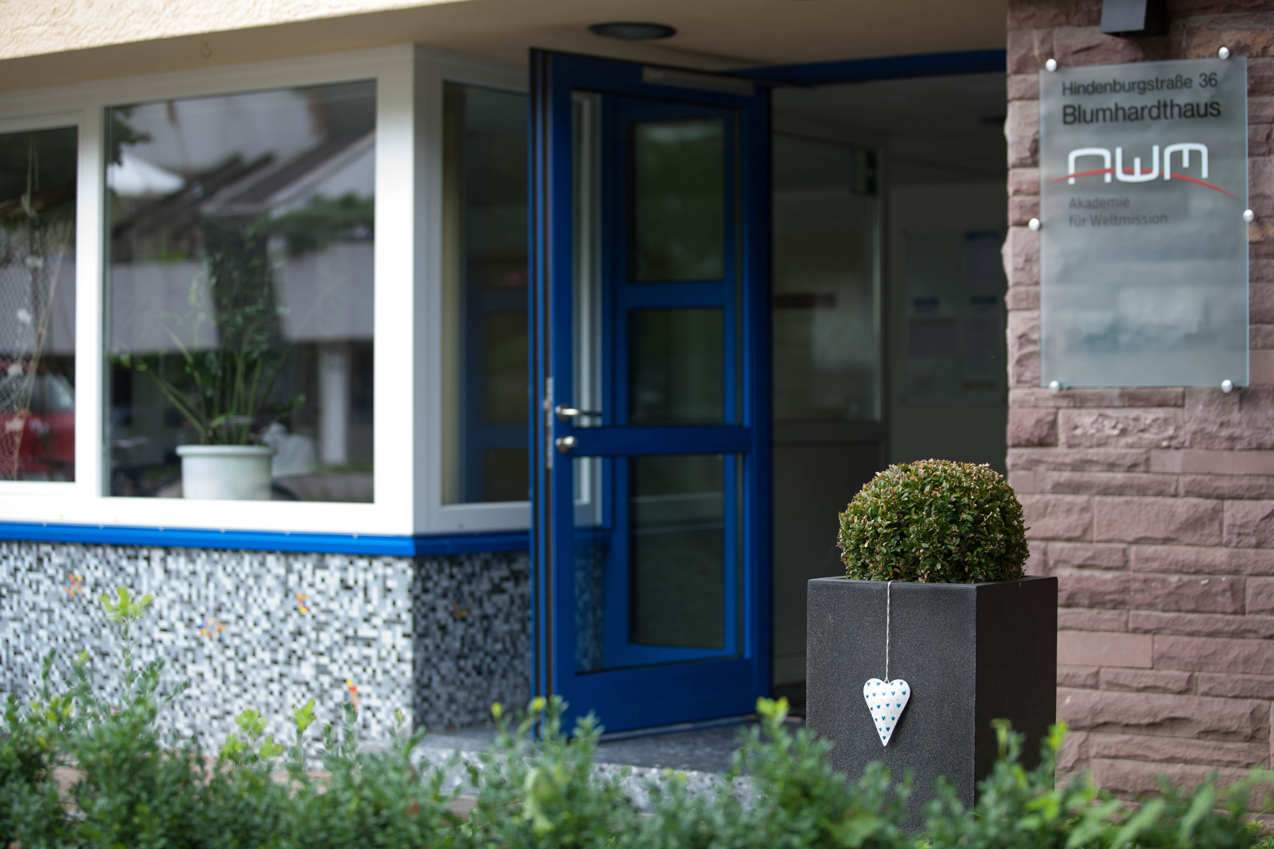 Akademie für Weltmission; Hauptgebäude; Haupteingang